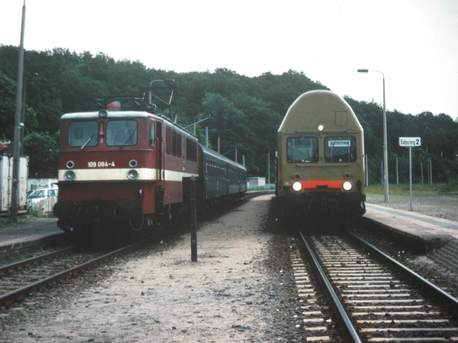 DR 109 084-4 1993 auf der Insel Rügen